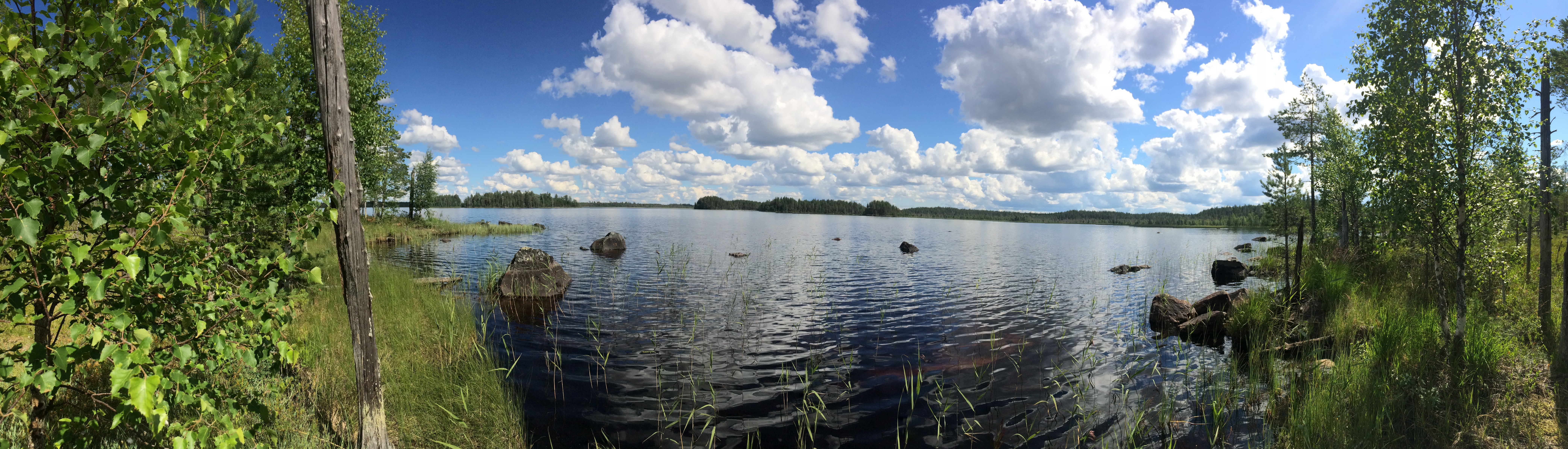 Нурмисъярви